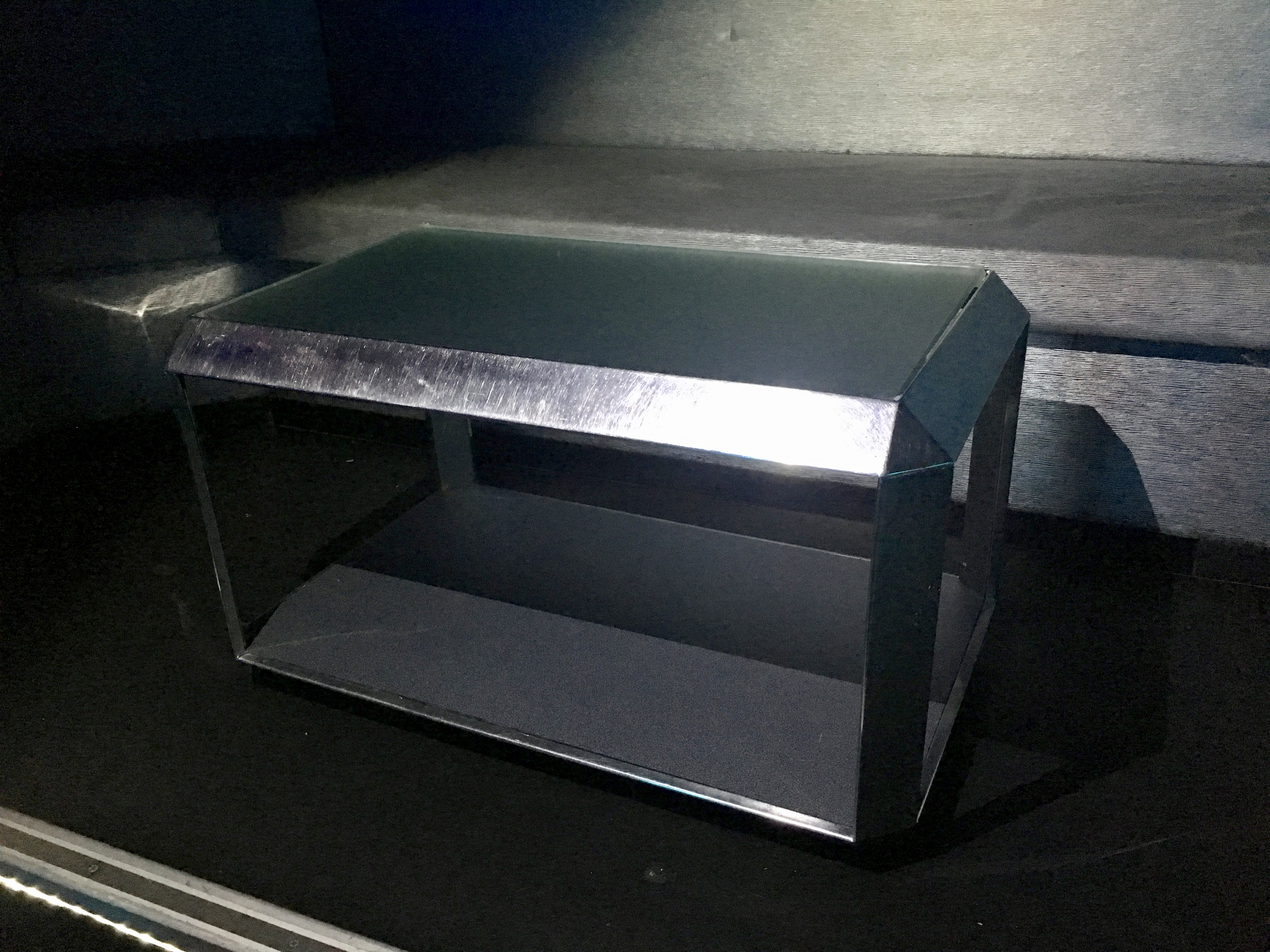 Space Electronic, discoteca di Firenze